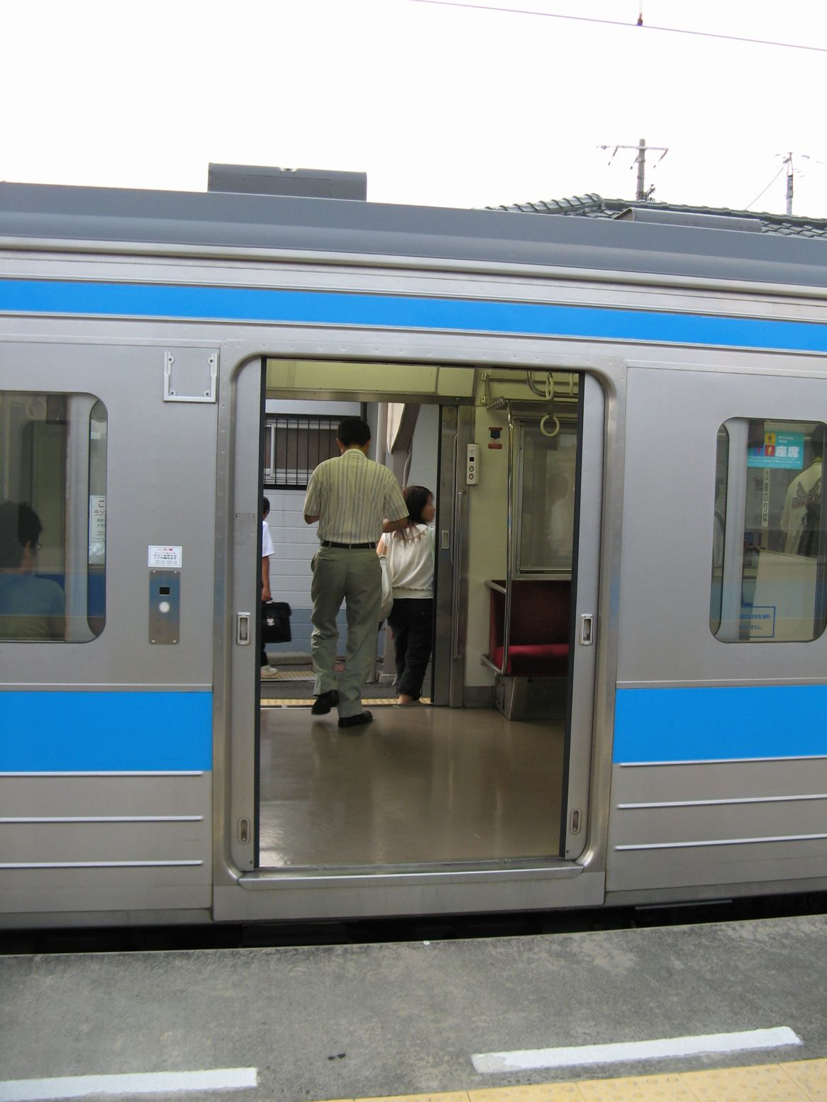 予讃線端岡駅 2番線に停車中の高松行き快速「サンポート」から撮影 ホーム向い1番線の普通列車は両側扉を開け、「サンポート」からの当駅下車客を駅舎へ通す